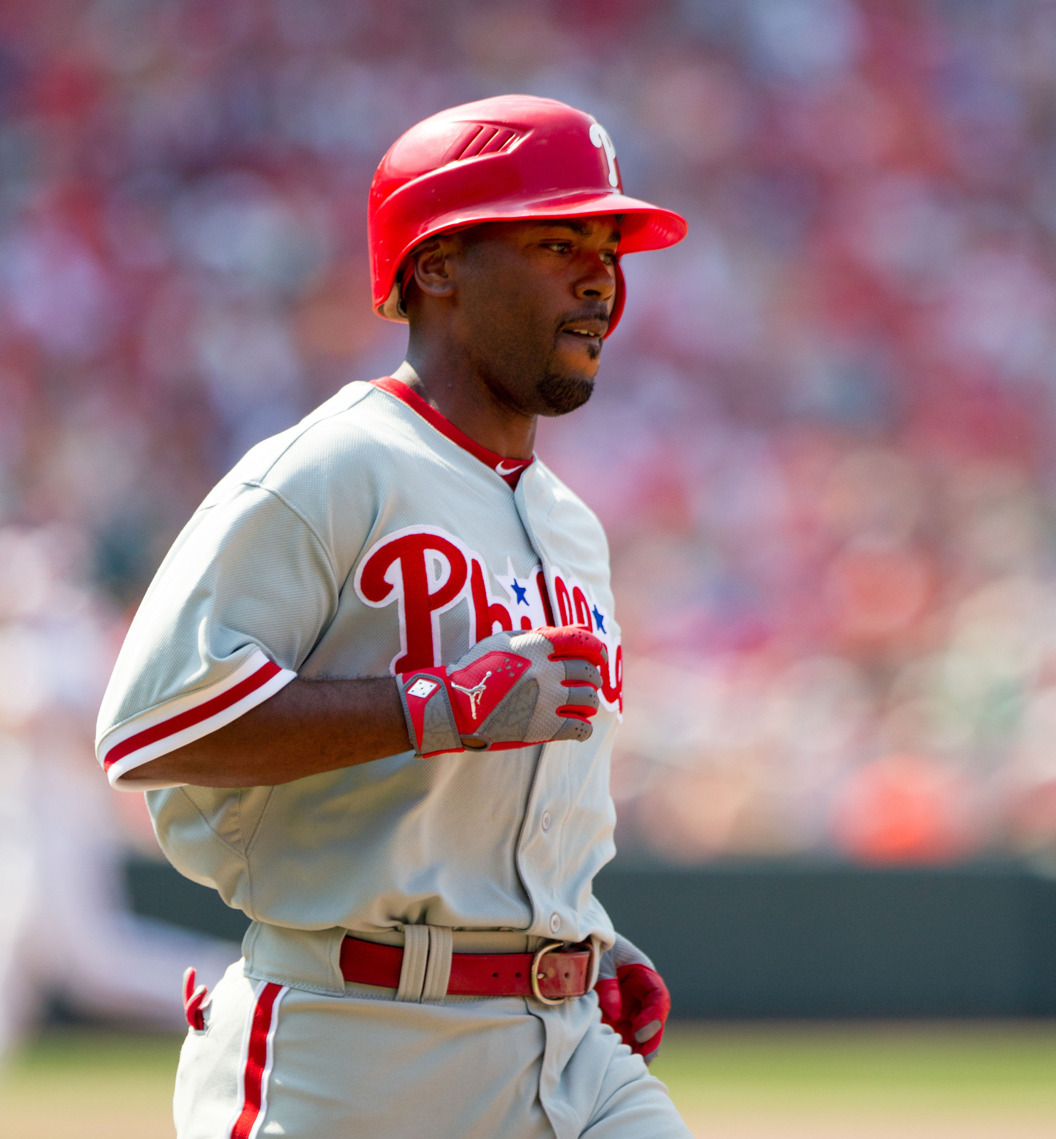 Phillies at Orioles June 10, 2012 Phillies at Orioles 2012